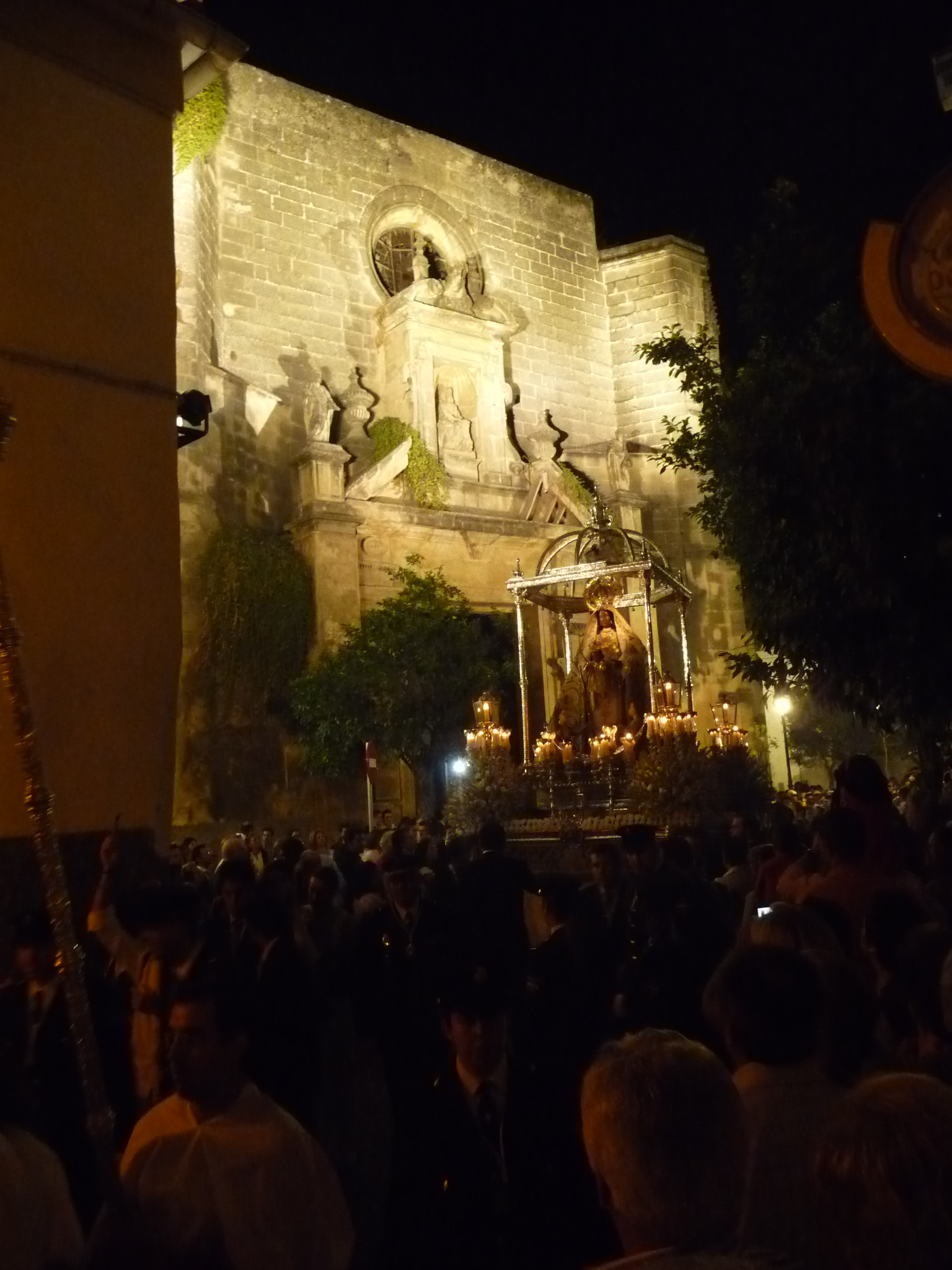 Merced-Jerez-P1040554.JPG